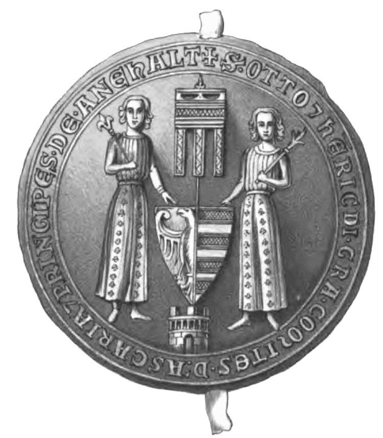 Gemeinschaftliches Siegel der Fürsten Otto I. und Heinrich III. von Anhalt (Original veröffentlicht im Codex diplomaticus anhaltinus, Band 2)